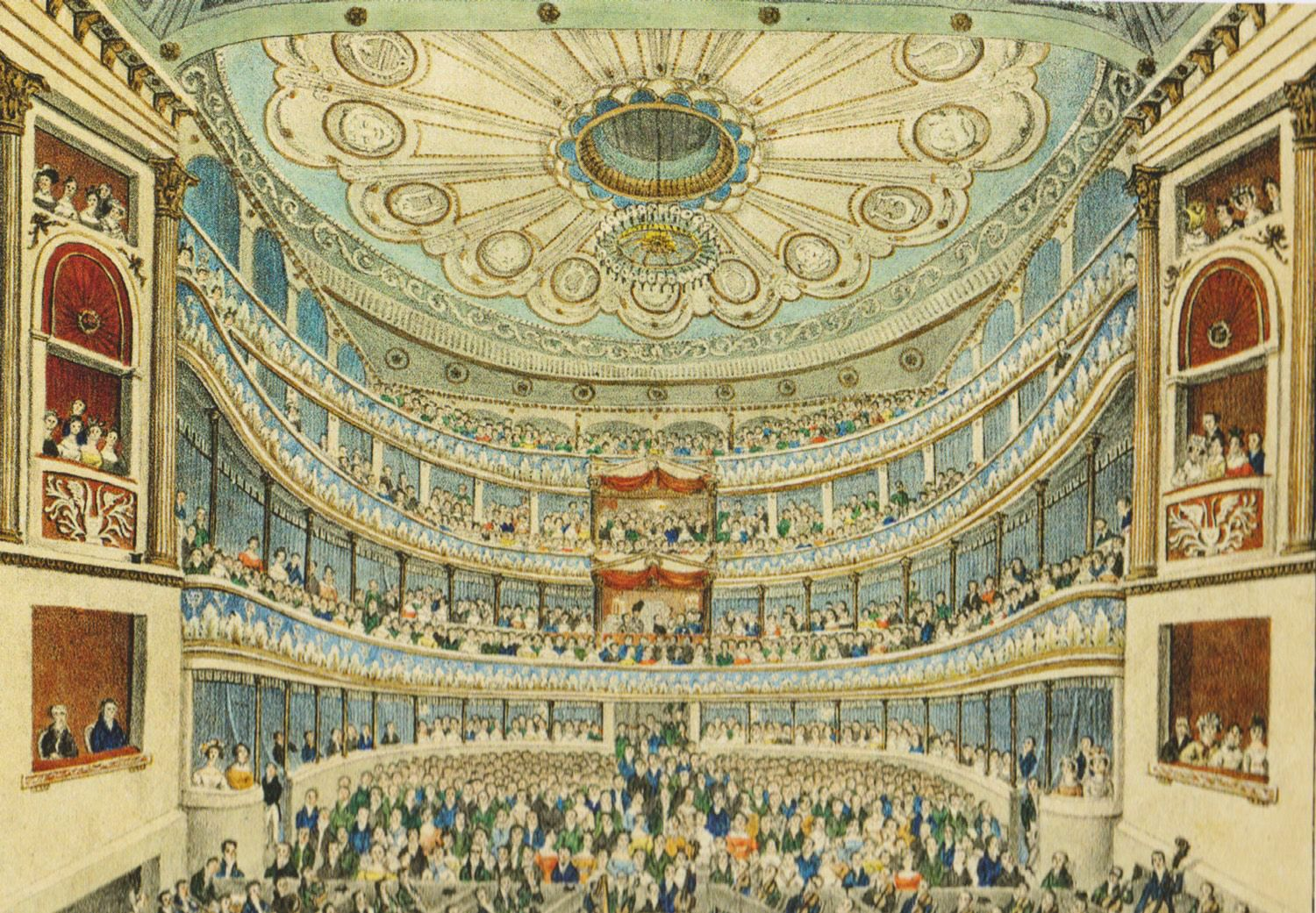 Der Saal des Alten Theaters in Leipzig. Lithographie